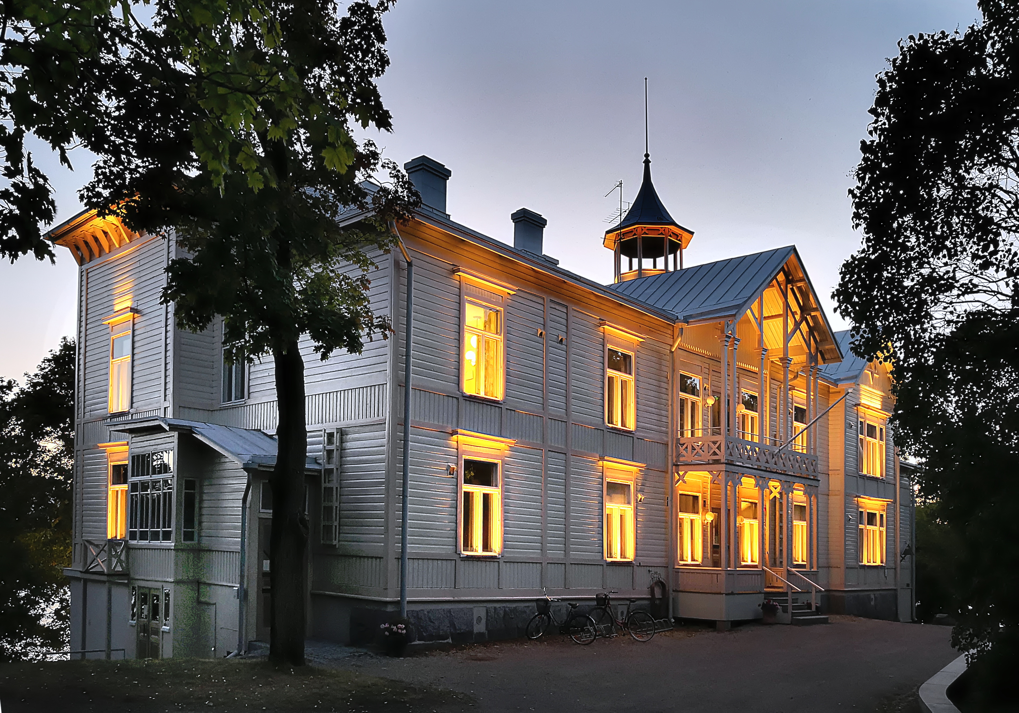 Villa Kivi enlightens dark August evenings in Helsinki